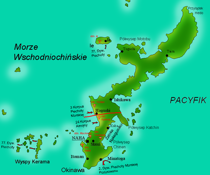 Mapka inwazji na Okinawę. Autor: Ssawka Grafika udostępniona na licencji GFDL